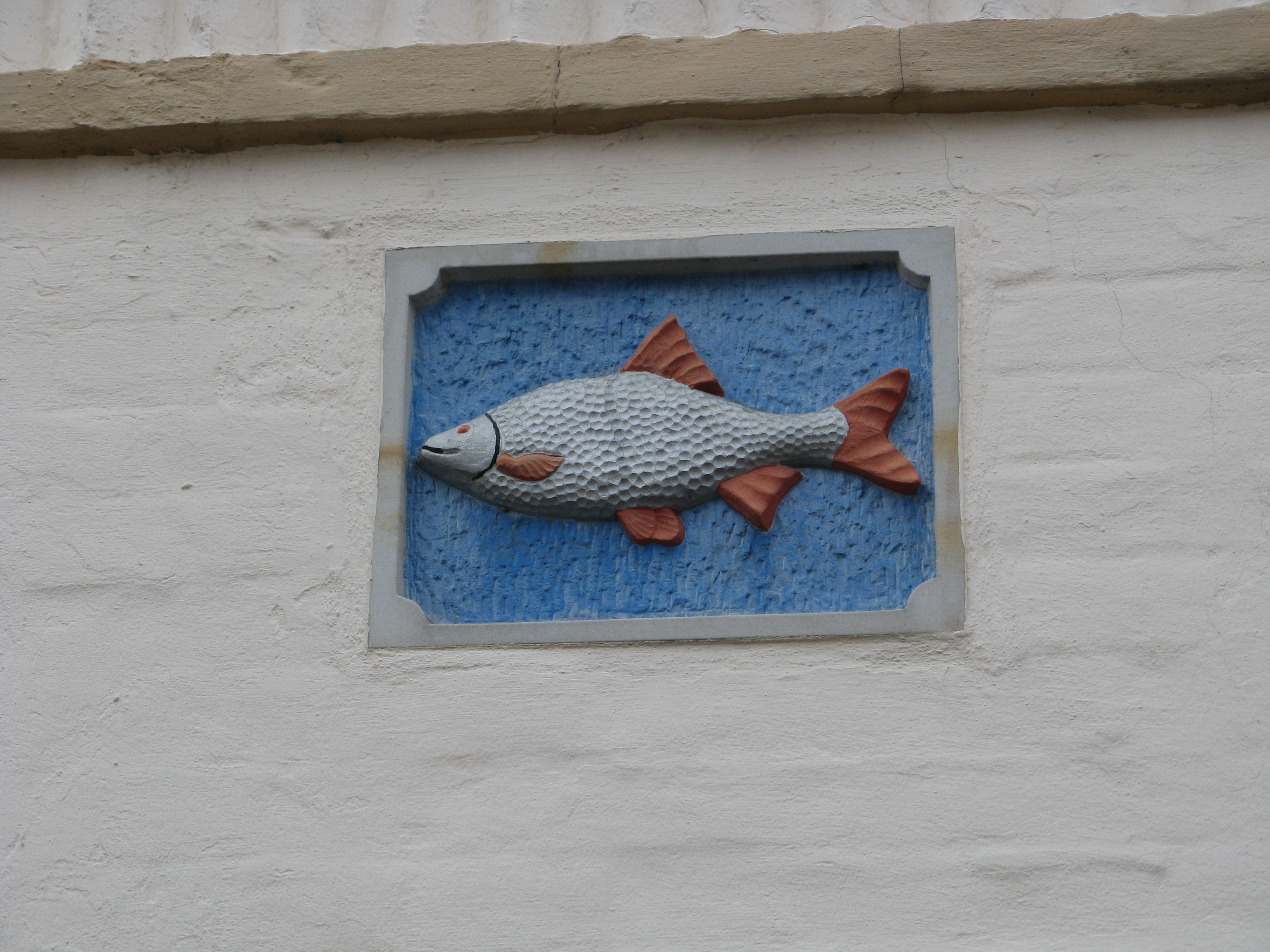 house in Friedrichstadt Author: Dirk Ingo Franke